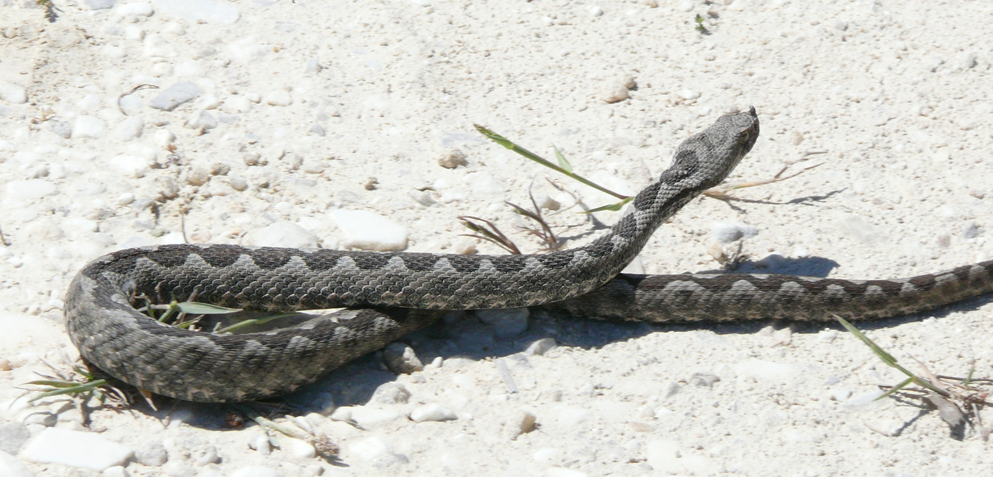 Vipera ammodytes